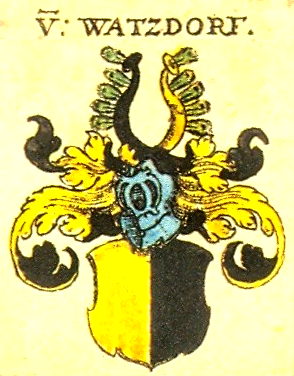 Wappen der Familie von Watzdorf nach Siebmachers Wappenbuch